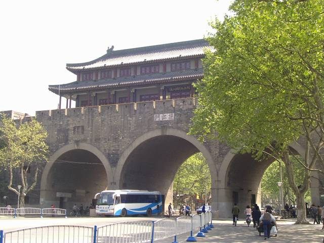 渡江勝利紀念館 挹江門 2004年4月16日撮影 撮影者：権作 参照：